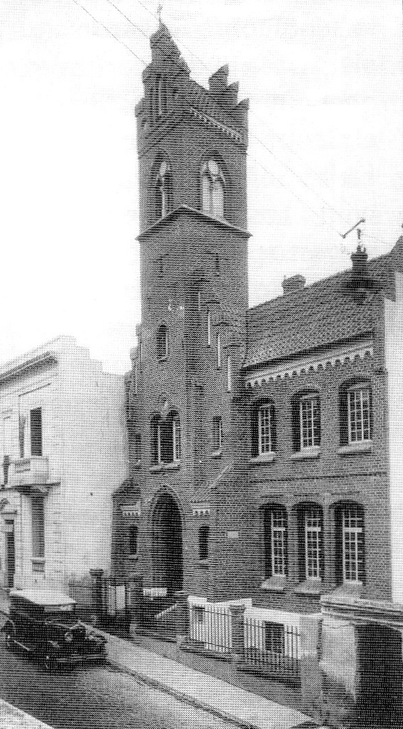 Frente de la Iglesia en el año de su fundación.